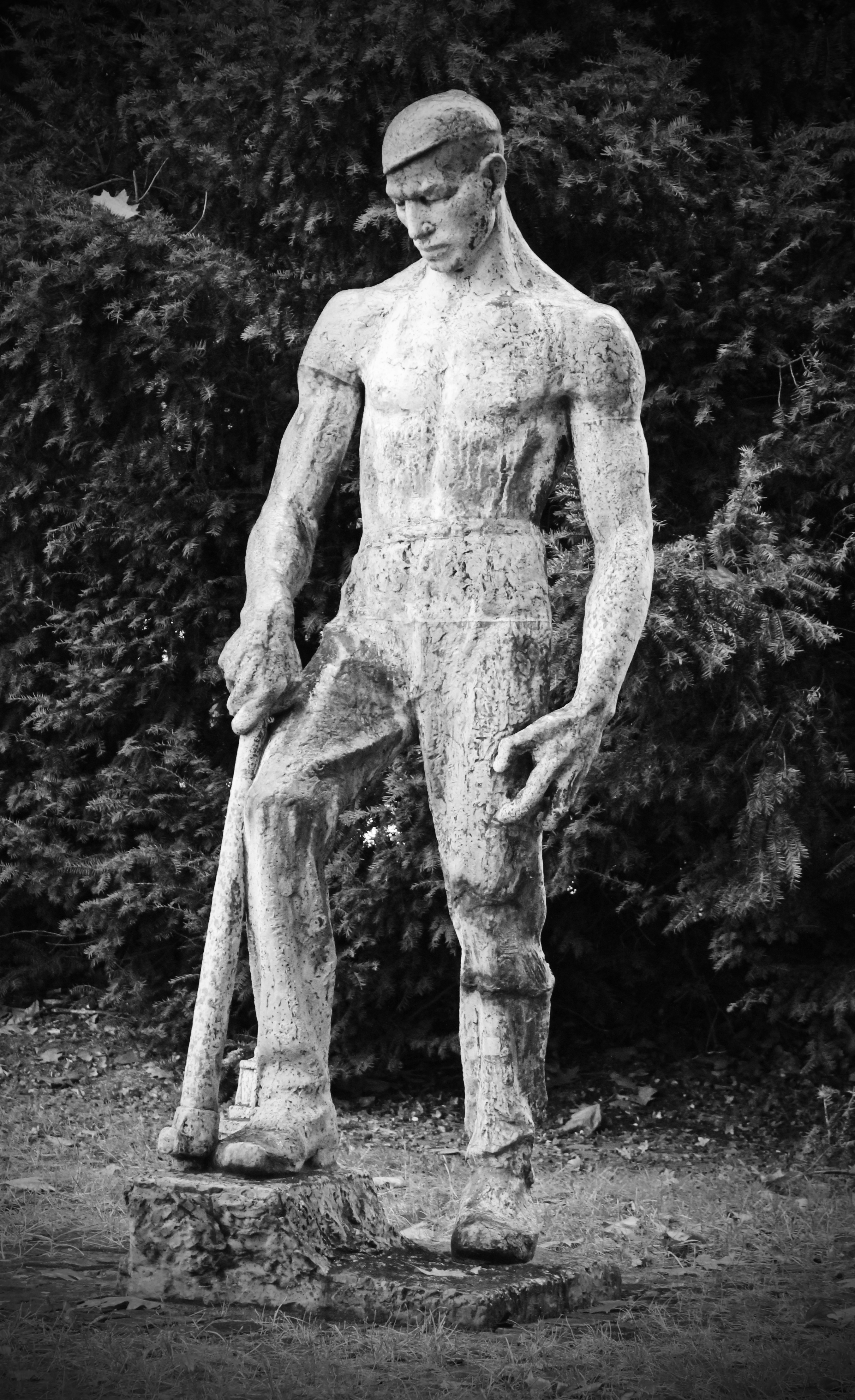 Denkmal-Beschreibung: "Knochen-Karl" Das Denkmal erinnert an die 475 Toten, die die Zeche "Vereinigte Constantin der Große" in Folge des 1. Weltkriegs zu beklagen hatte. Geschaffen durch Prof. Josef Enseling nach dem Modell von Karl Mieling, der auf Grund seines markanten Körperbaus auf der Zeche Constantin den Spitznamen "Knochen-Karl" hatte. Eingeweiht am 2. August 1937. Rückkehr an diesen Platz durch den Initiator Heinz Esken. 7. November 1987, Glückauf! Erstellung dieser Gedenktafel durch REVAG e.V. Herne, 14.10.2012"